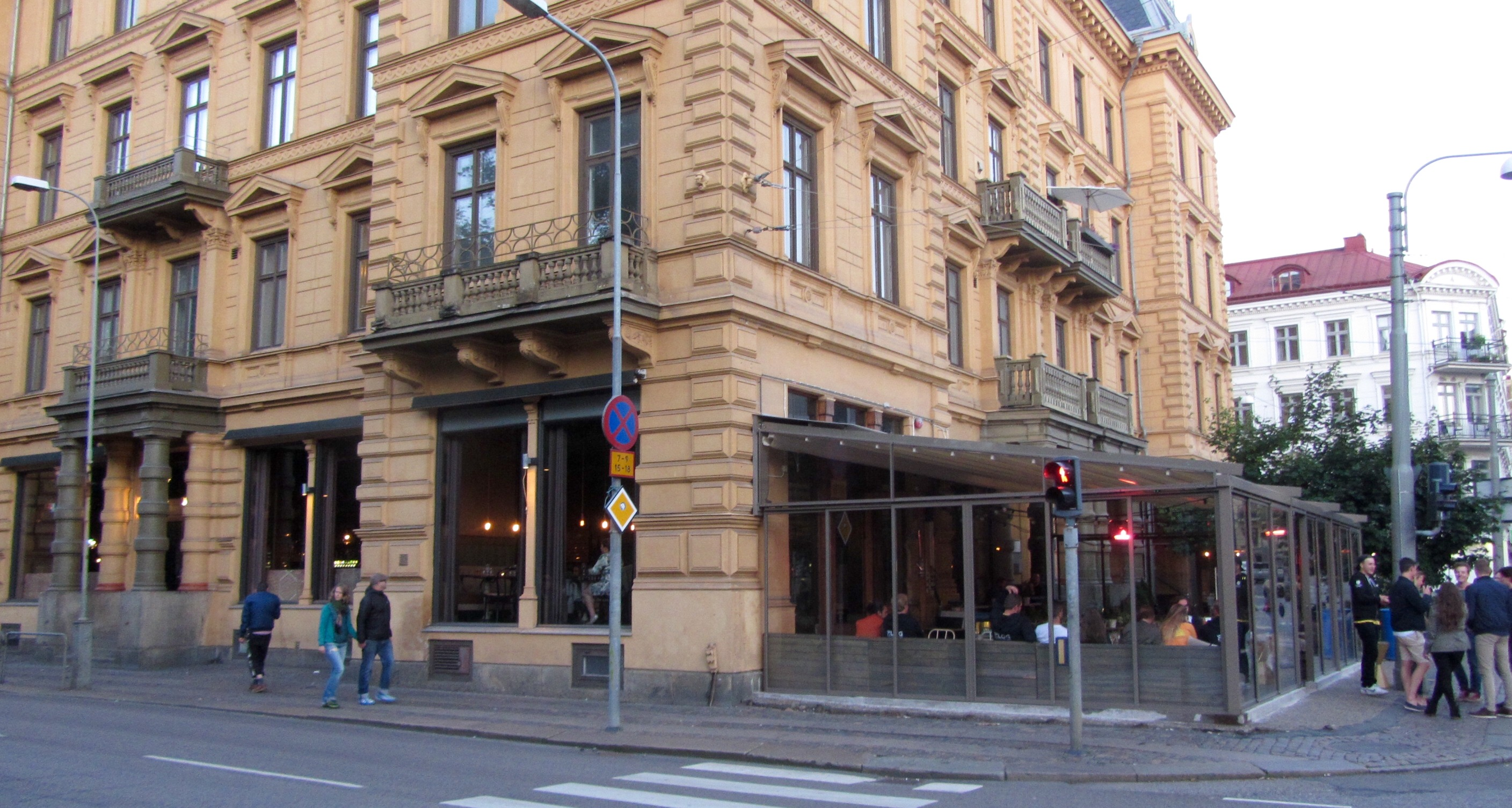 Restaurant Vasastan, Parkgatan 5, stadsdelen Vasastaden, Göteborg.